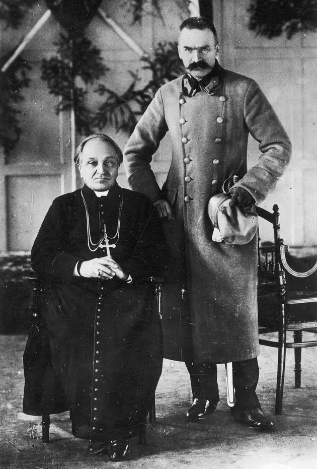 Józef Piłsudski z biskupem Władysławem Bandurskim